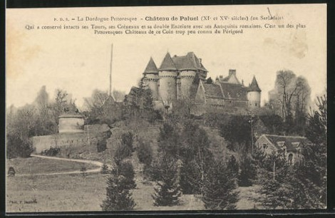 Carte postale ancienne du château de Paluelchâteau de Paluel, en Dordogne.